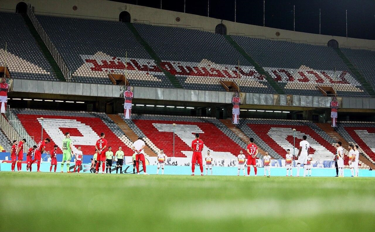 بازی پرسپولیس مقابل فولاد در استادیوم آزادی بدون تماشاگر بخاطر ویروس کرونا